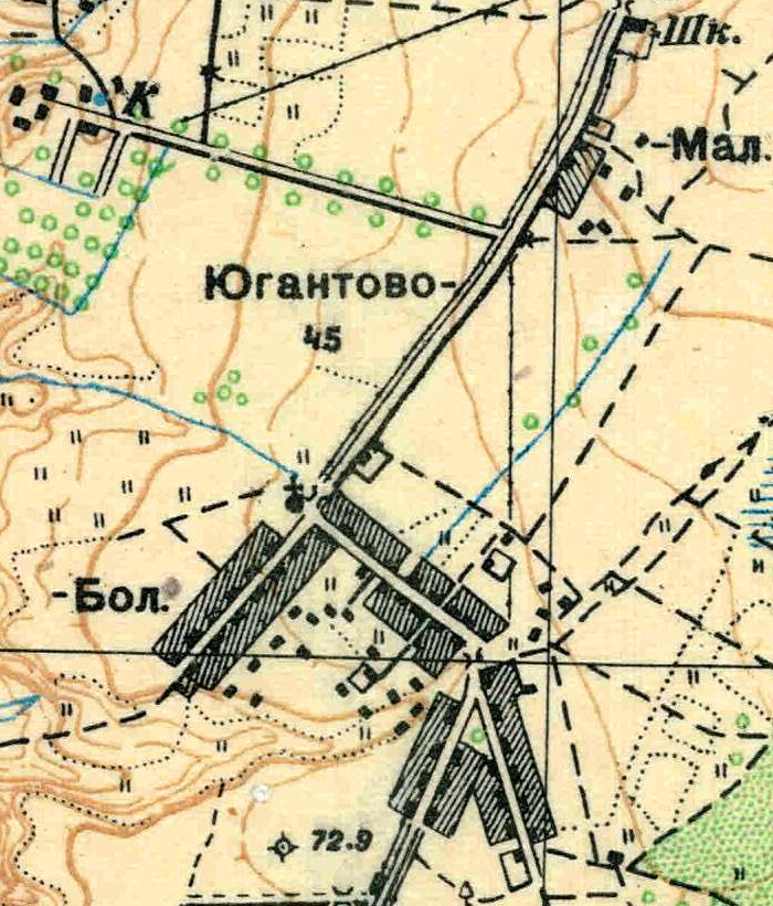 Топографическая карта Ленинградской области, квадрат О-35-9-Г-г (Косколово), деревня Югантово